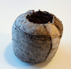 Kokkupressitud kasvuturvas mis on kaetud paberiga.